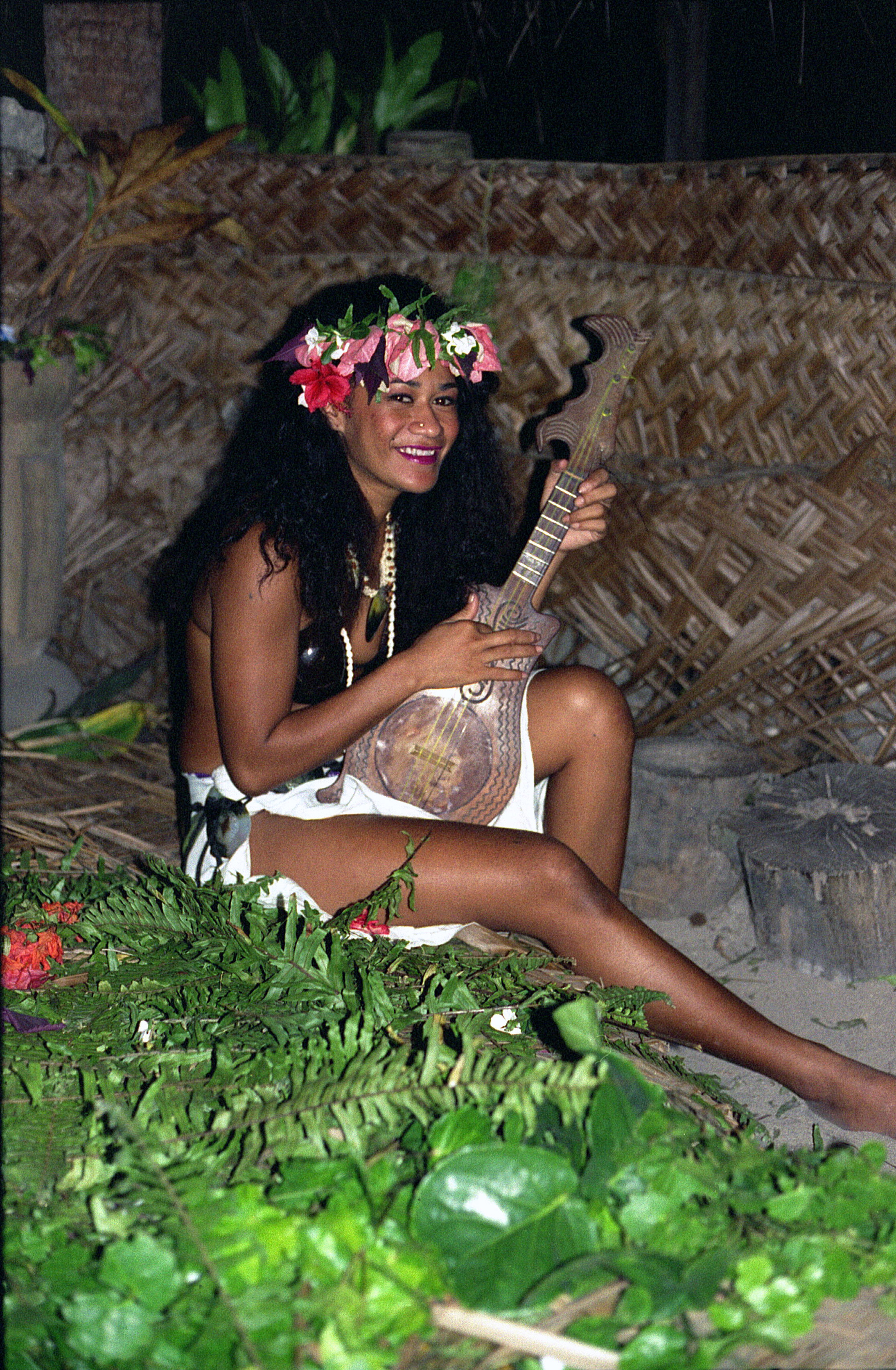 polynésie, mooréa, vahiné